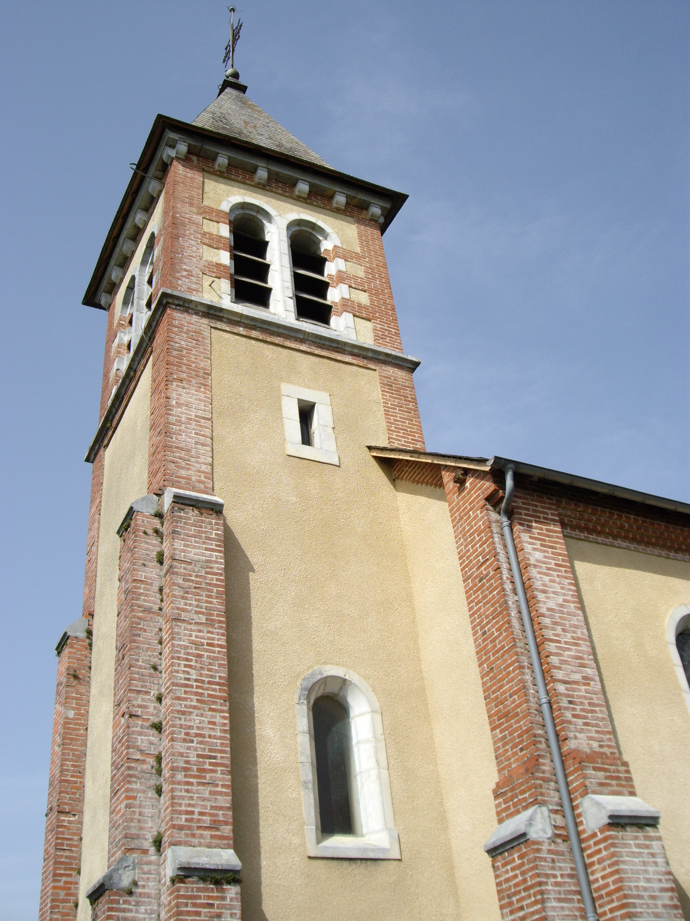 Église Saint-Etienne d'Hibarette (65)